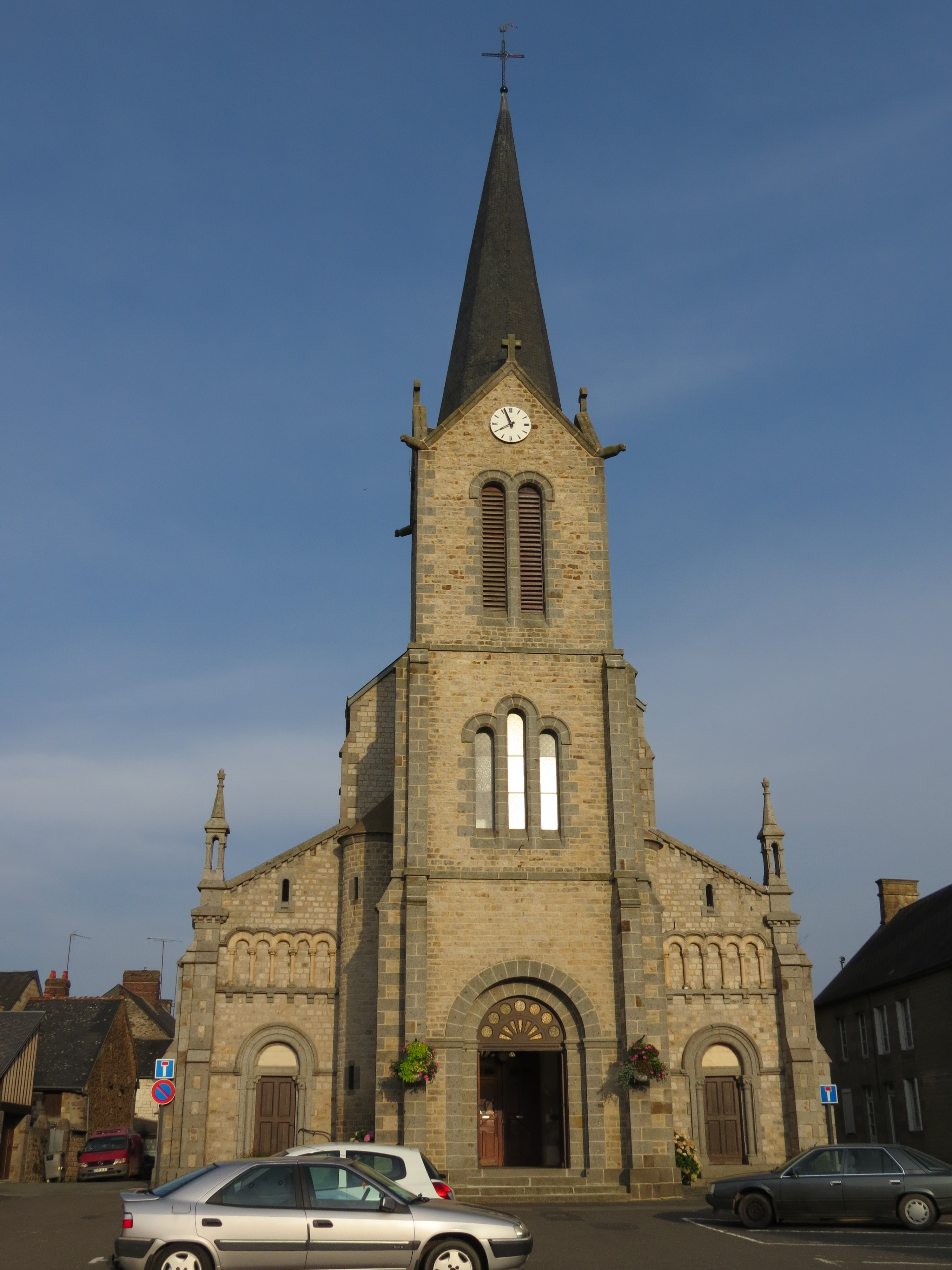 Église Sainte-Marie-Madeleine.